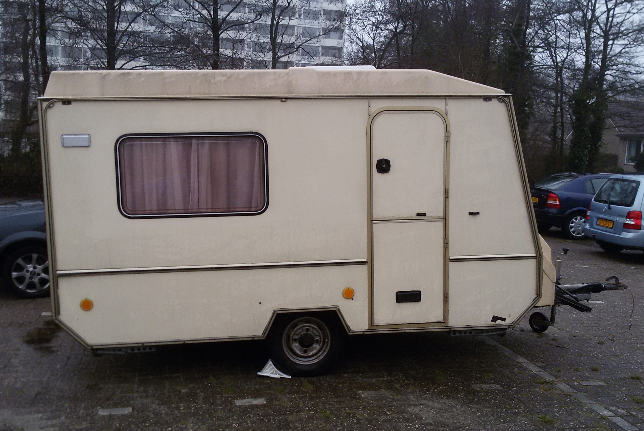 Bastei 351 - VEB IFA Karosseriewerke Dresden, DDR